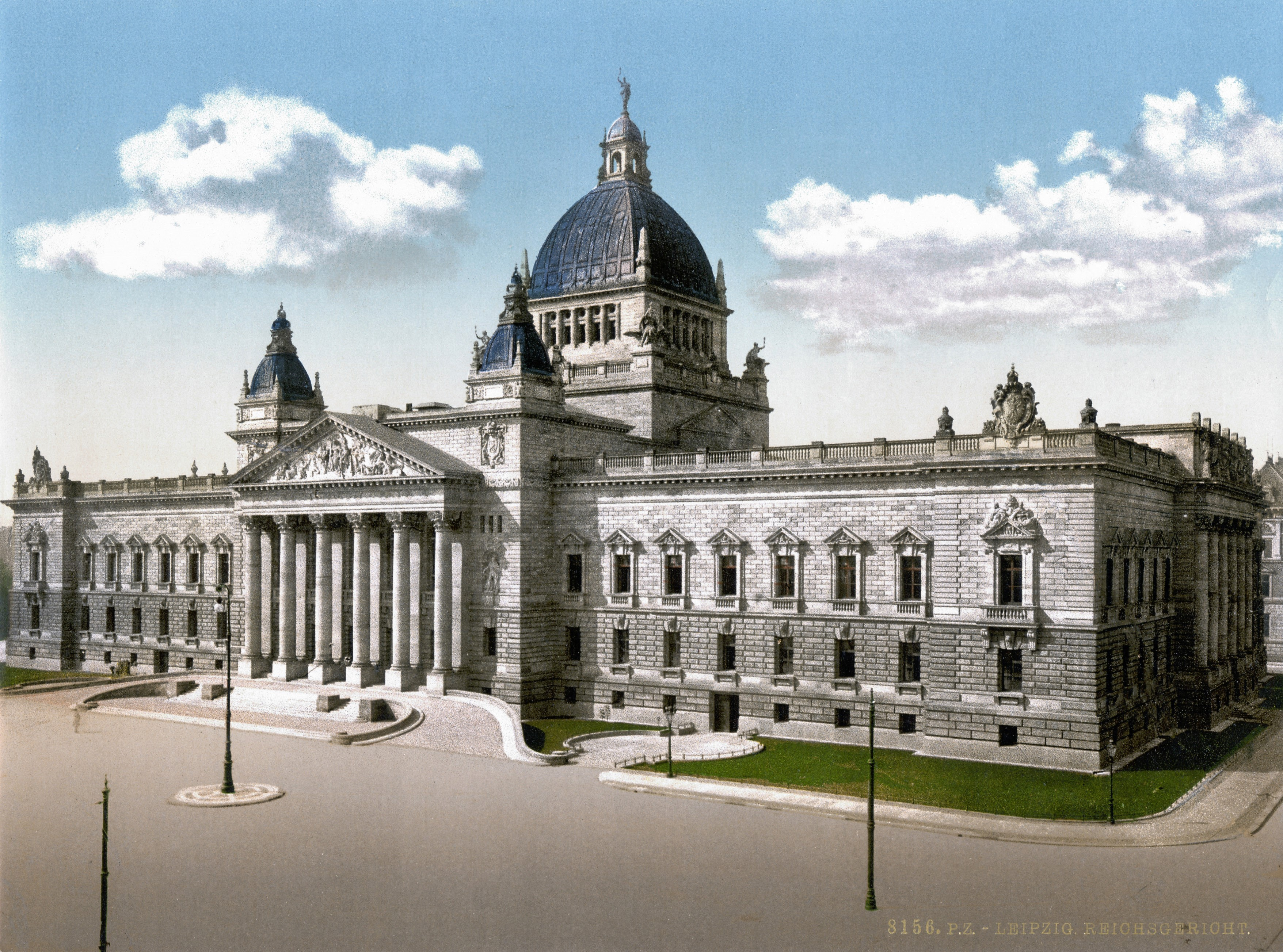 Reichsgericht Leipzig um 1900